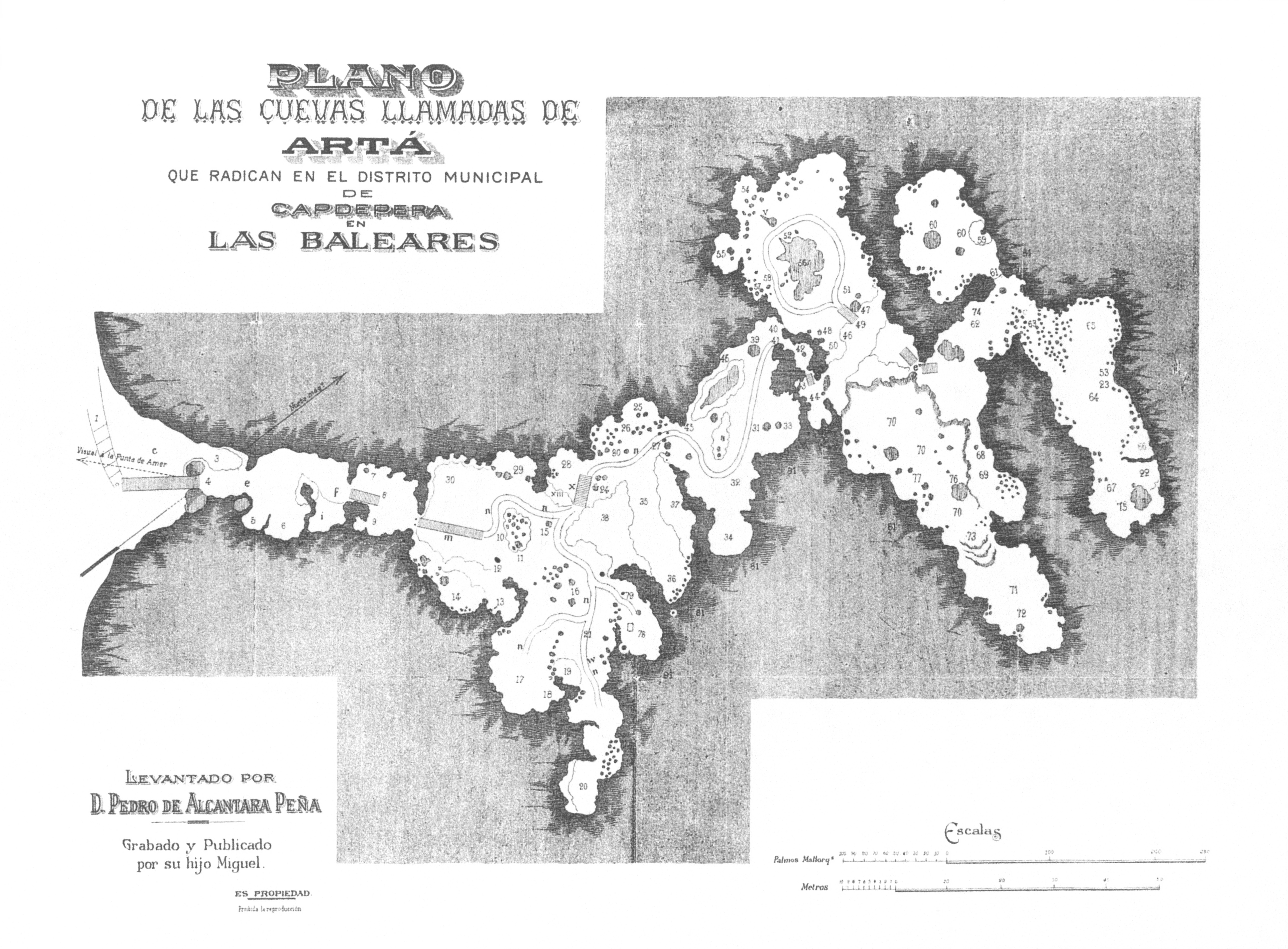 Plan der Coves d’Artà an der Ostküste von Mallorca, Spanien